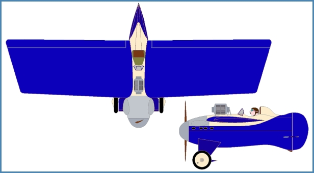 Arnoux Simlex 1922